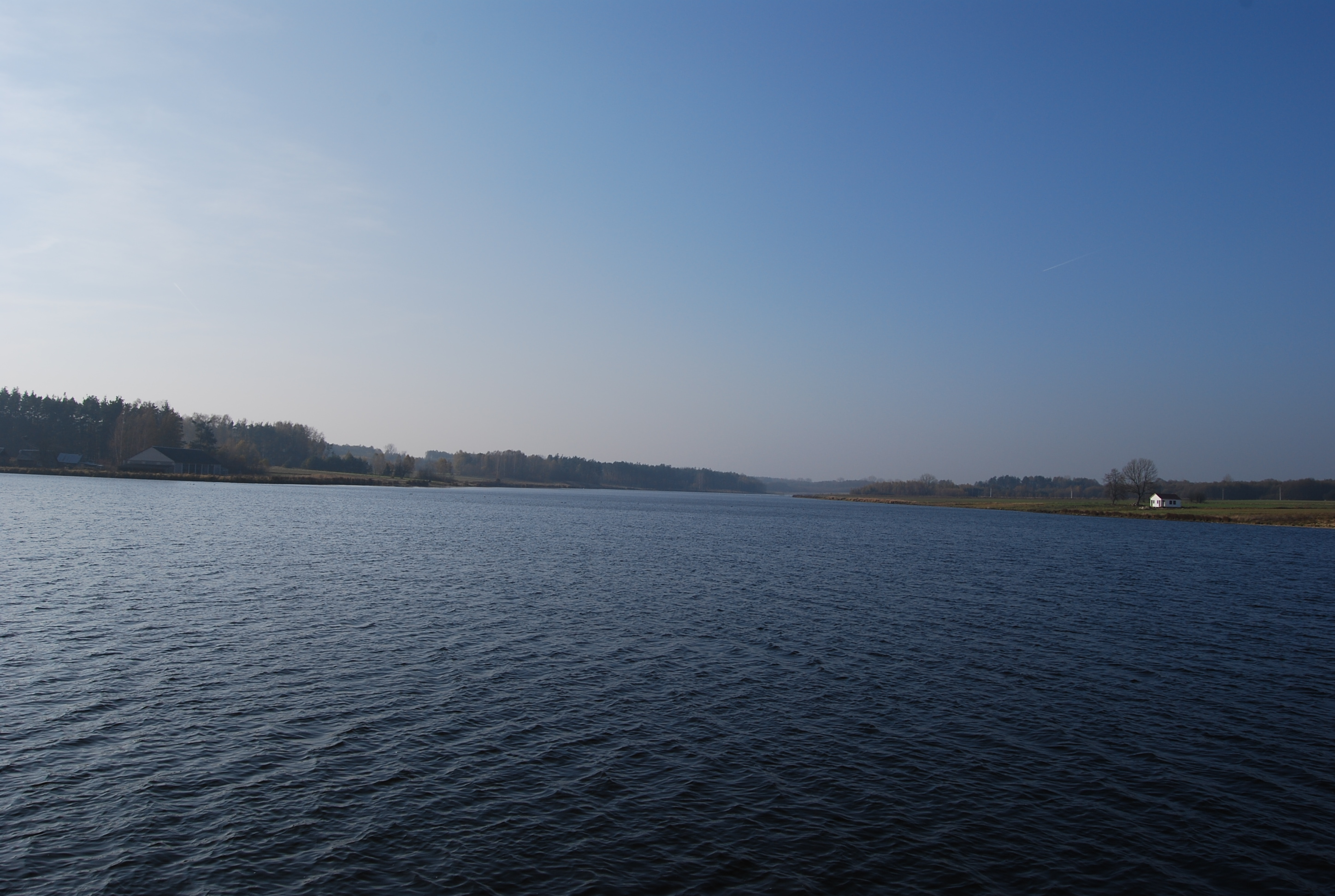 Zbiornik Niewiadoma, Gmina Sabnie, widok z zapory.